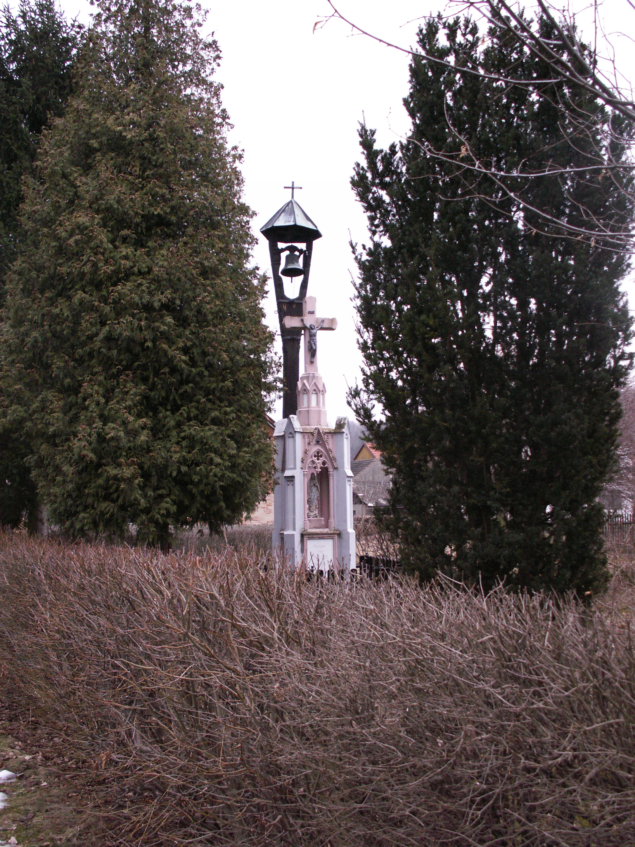 Brloh, okres Pardubice, zvonička a kamenný kříž, stav v roce 2006